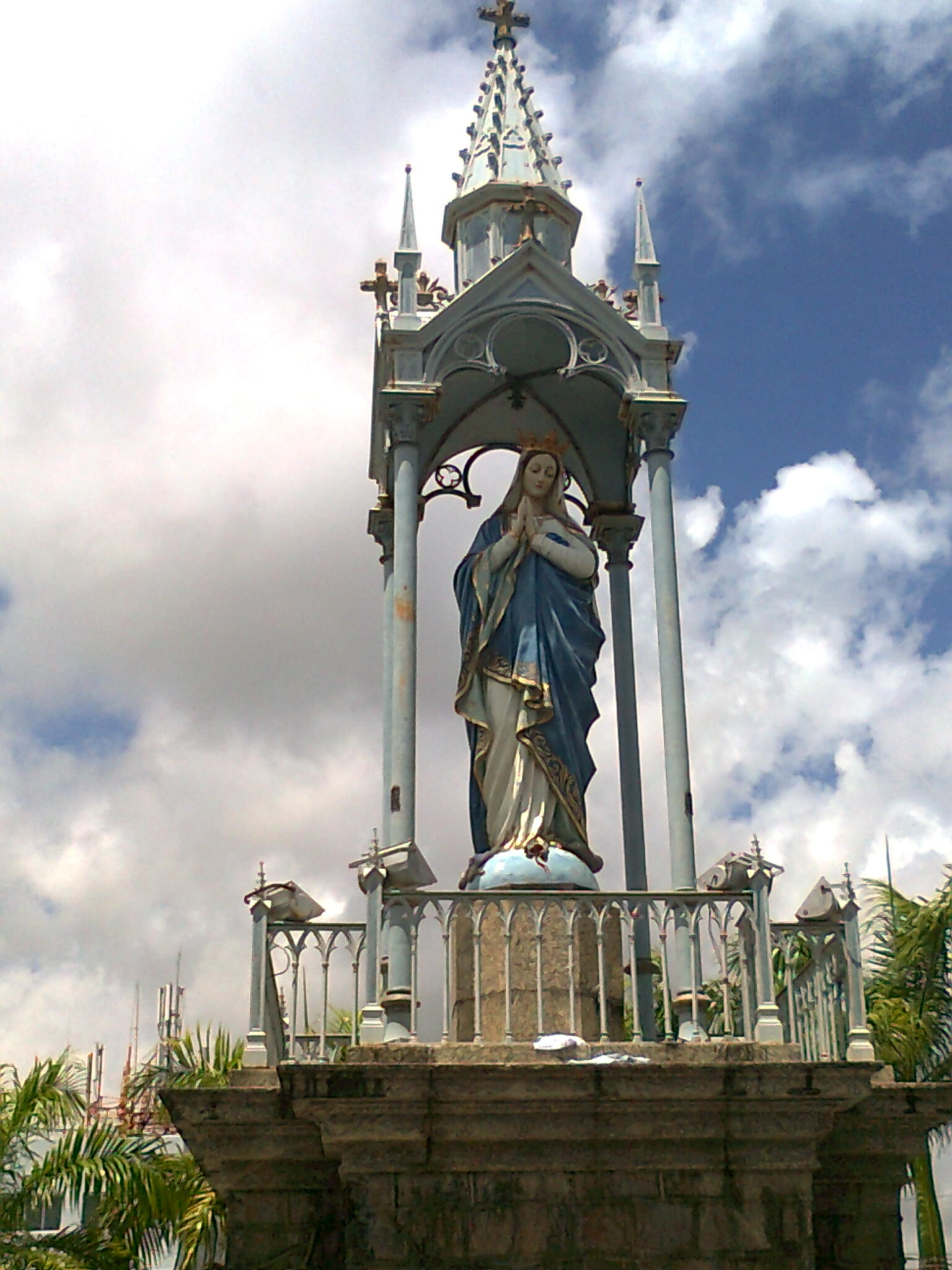 Monumento a Nossa Senhora da Conceição, no Morro da Conceição, Recife, Pernambuco, Brasil